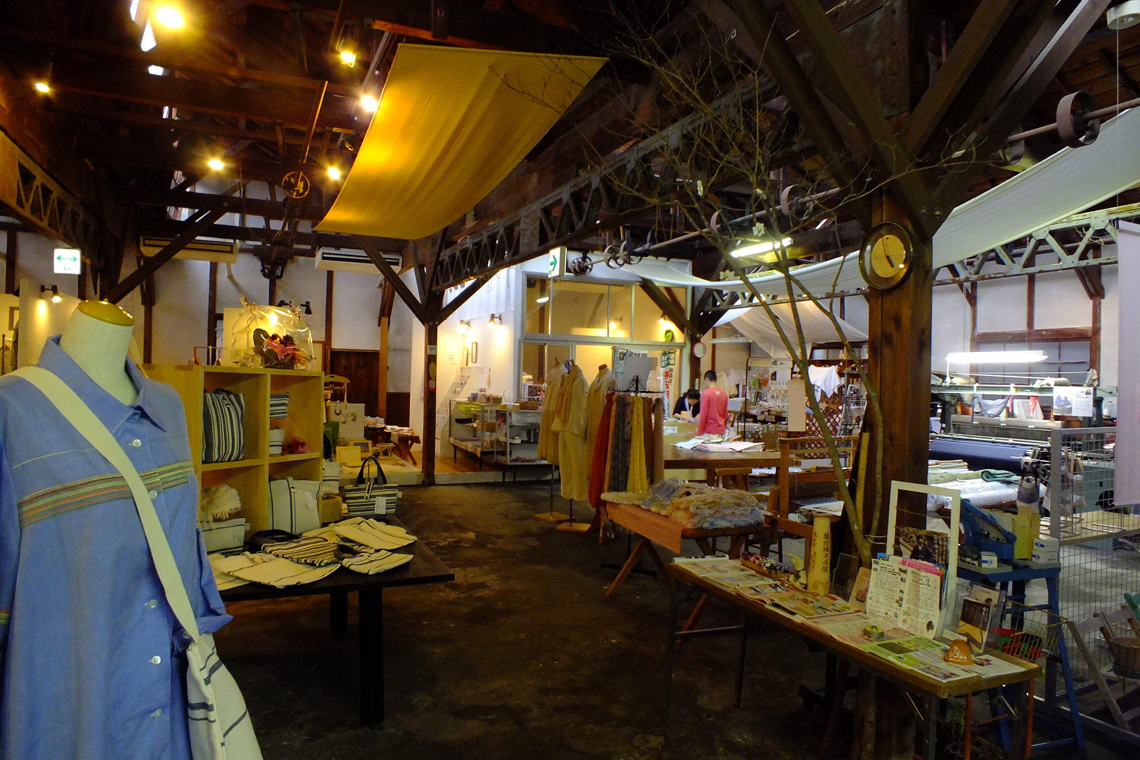 Banshu-ori kobokan 播州織工房館